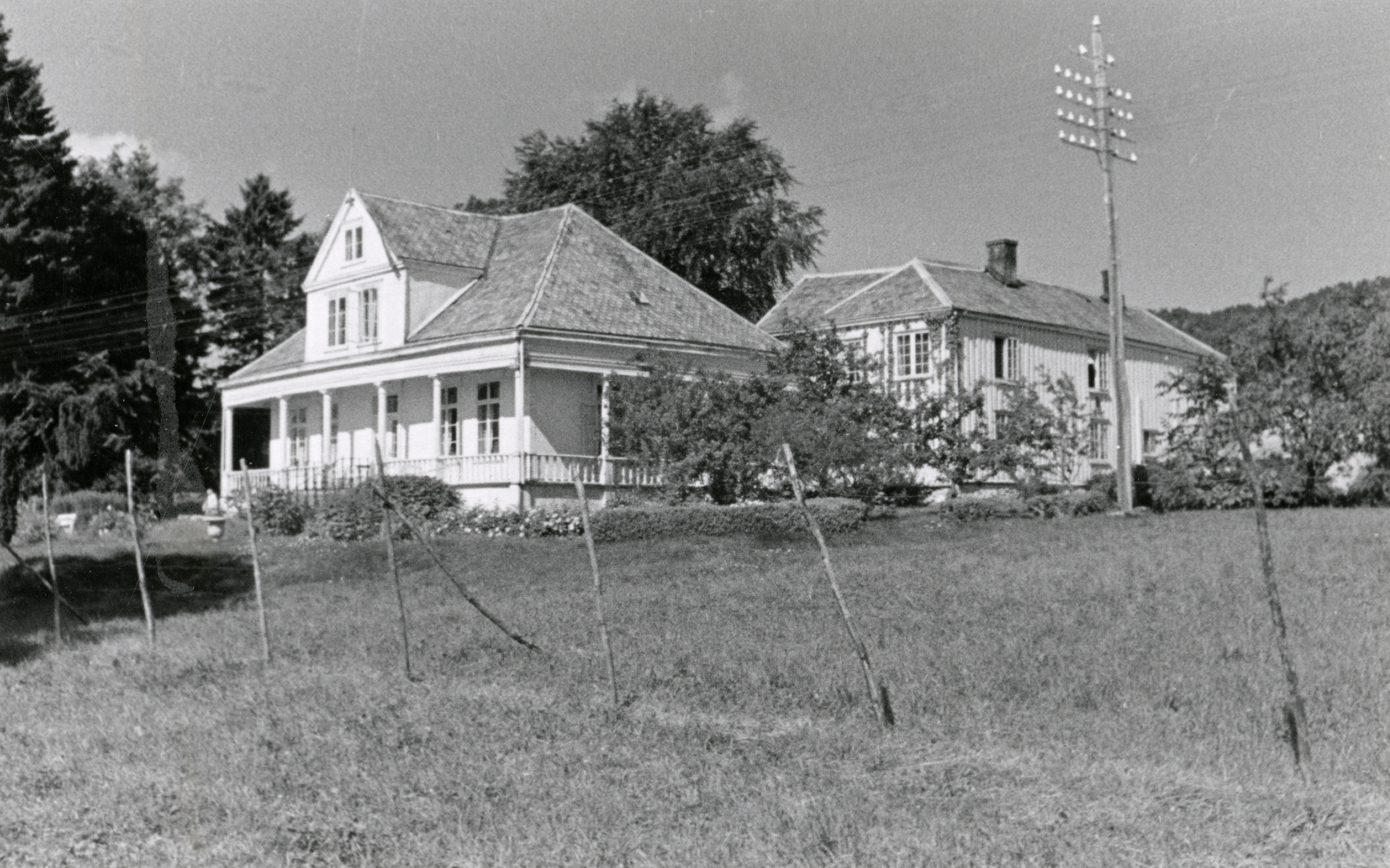 Berg Nøisomhet i Bolsøy, Møre og Romsdal